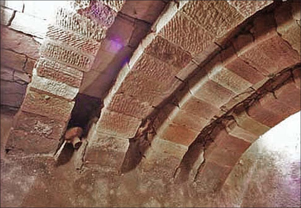 Résidence ez Zantur IV. Rooms 5, 22, 23, 27, et 30 . Les arches d’une citerne.